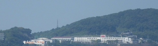 田上方面からの長崎県立長崎東高等学校の遠景